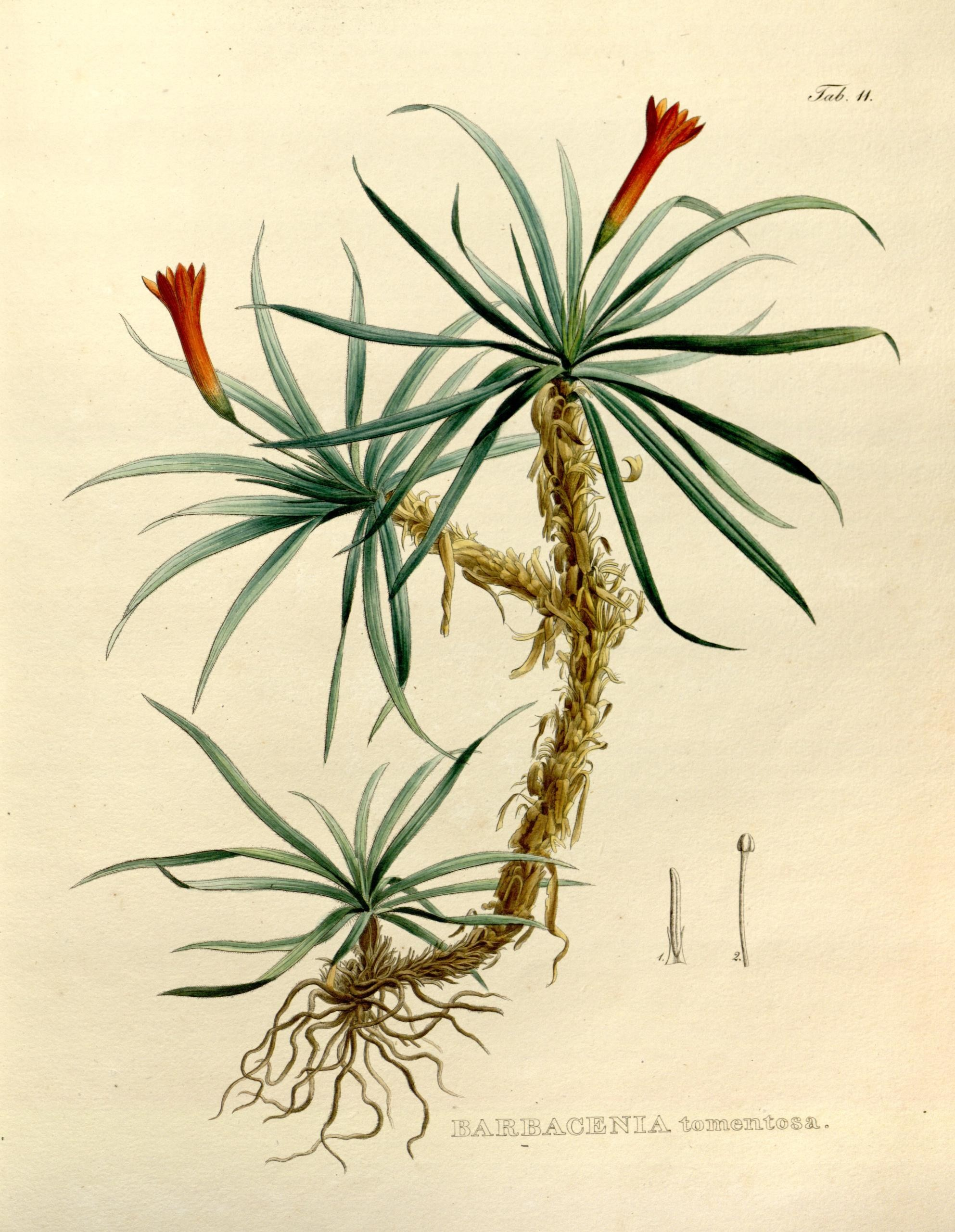 Barbacenia tomentosa Nova genera et species plantarum. Monachii [Munich] :Impensis Auctoris,1824-1829 [i.e. 1824-32]..